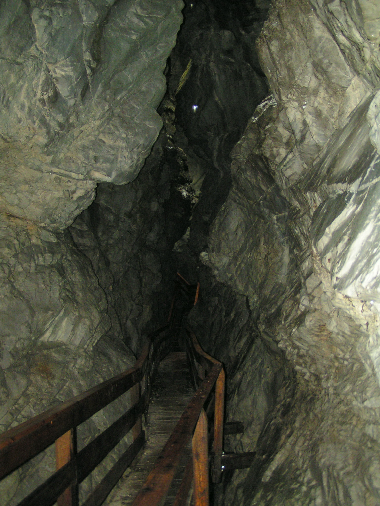 Vorderkaserklamm near Lofer in Austria